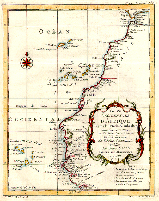 Coste Occidentale d'Afrique. Publiee par ordre du Comte de Maurepas en 1738.